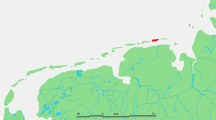 Wadden - Spiekeroog.PNG